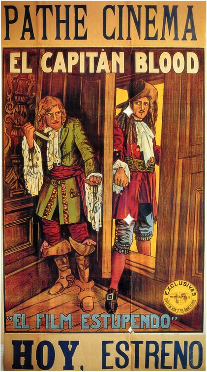 Постер фильма "Капитан Блад" США, 1924 г.